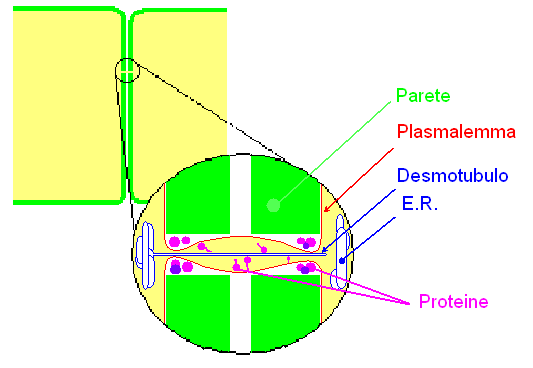 schema della possibile struttura di un plasmodesma